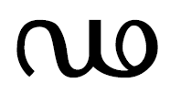 дхакарам мурдханья